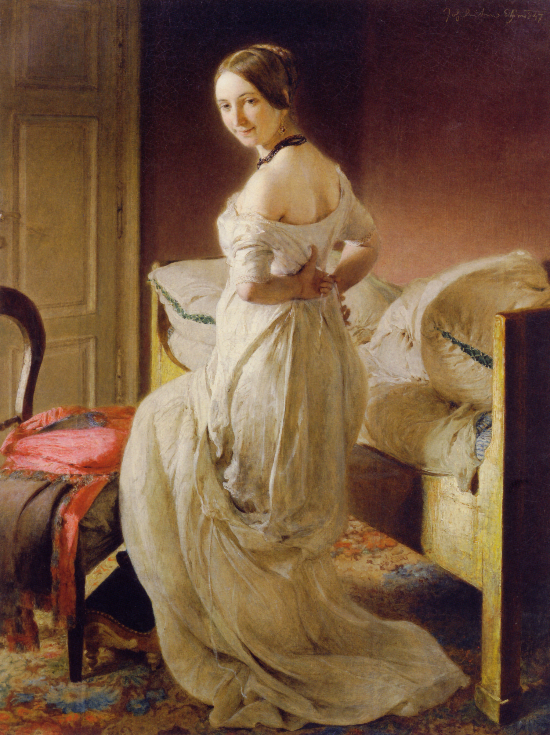 Betrachtung im Neglige